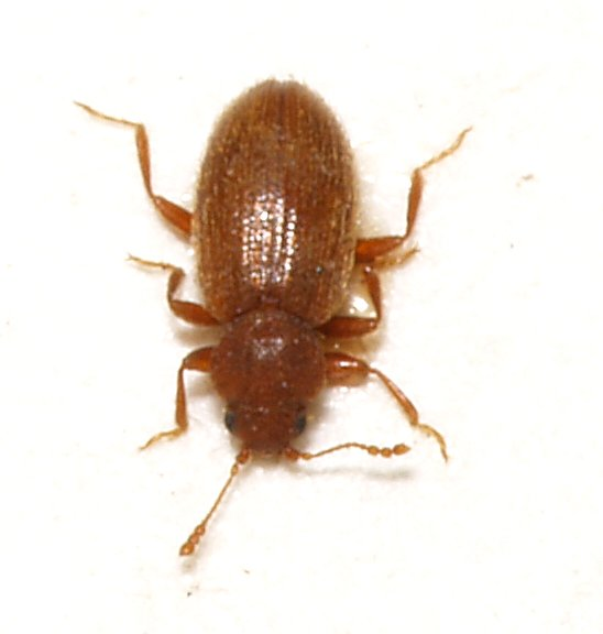 undetermined Latridiidae.